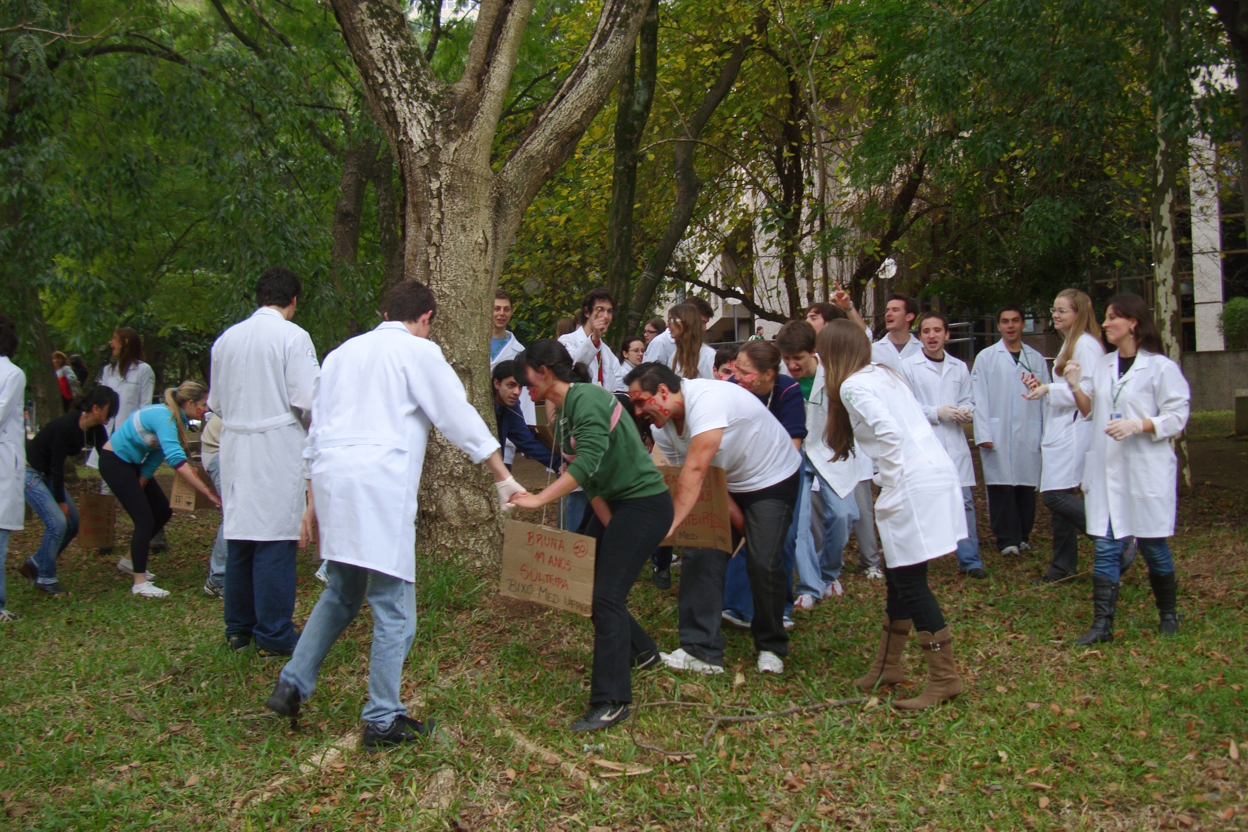 Trote nos calouros (bixos) do Curso de Medicina da Universidade Federal do Rio Grande do Sul